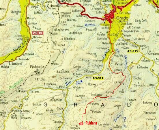 Mapa de acceso a la Parroquia de Rubiano (Grado), en el Principado de Asturias, en el norte de España